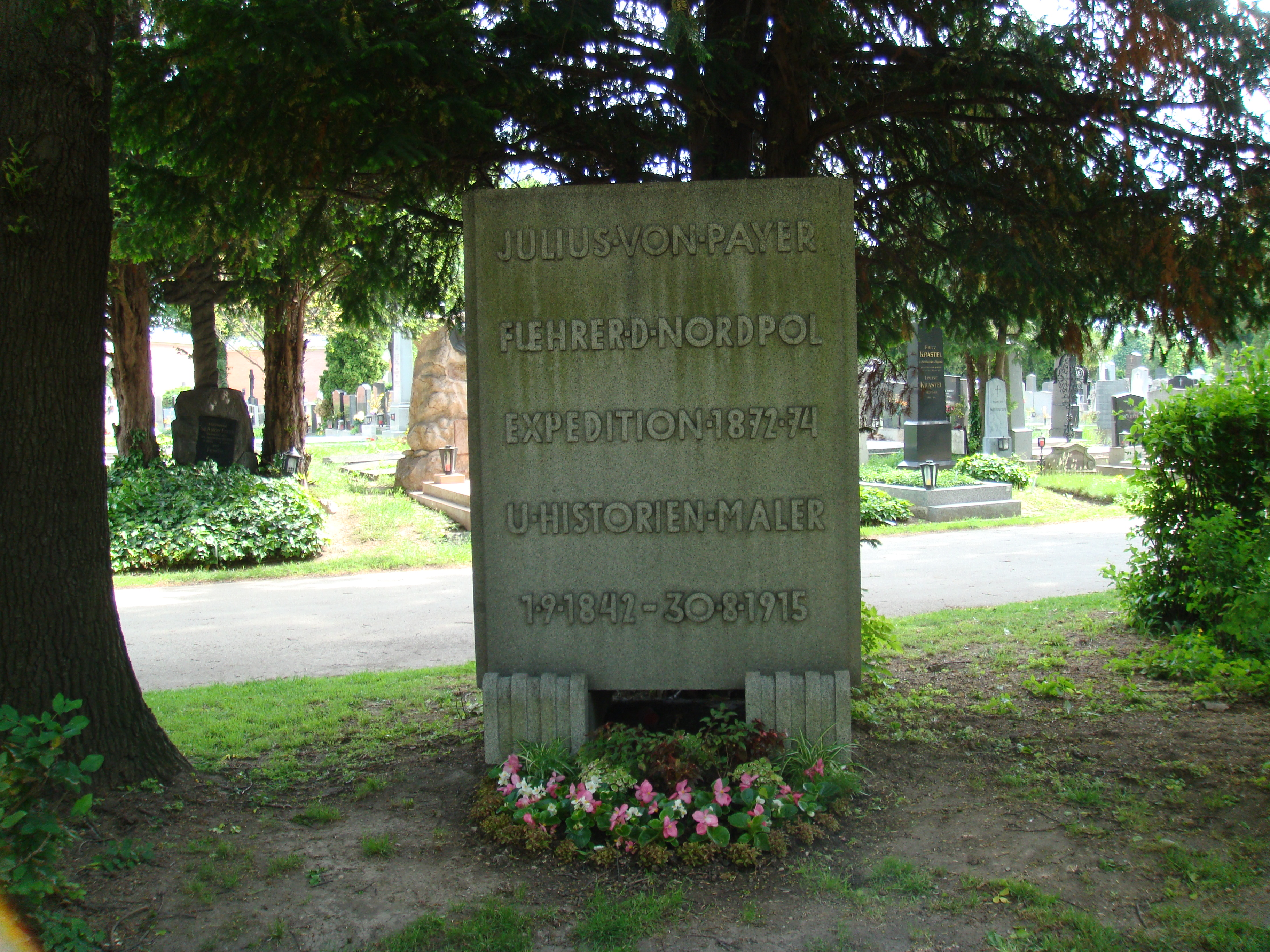 Grabmal von Julius von Payer auf dem Wiener Zentralfriedhof